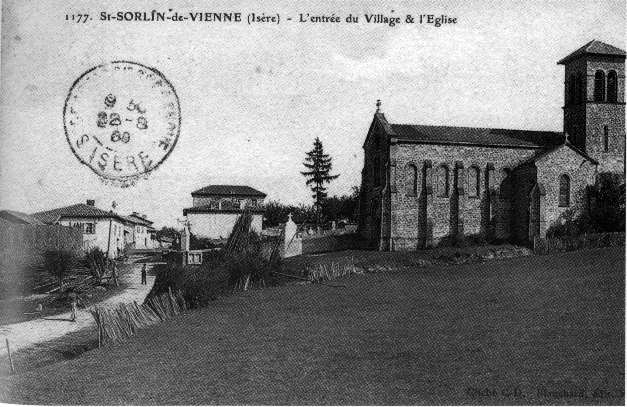 Saint-Sorlin-de-Vienne, l'entrée du village et l'église, 1909